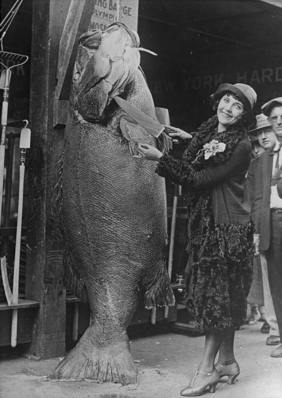 Ein seltener Fang! Ein Riesenfisch im Gewicht von 579 Pfund wurde an der Küste Los Angeles / Californien gefangen. Der Riesenfisch wurde auf der Strasse Los Angeles öffentlich zur Schau gestellt.